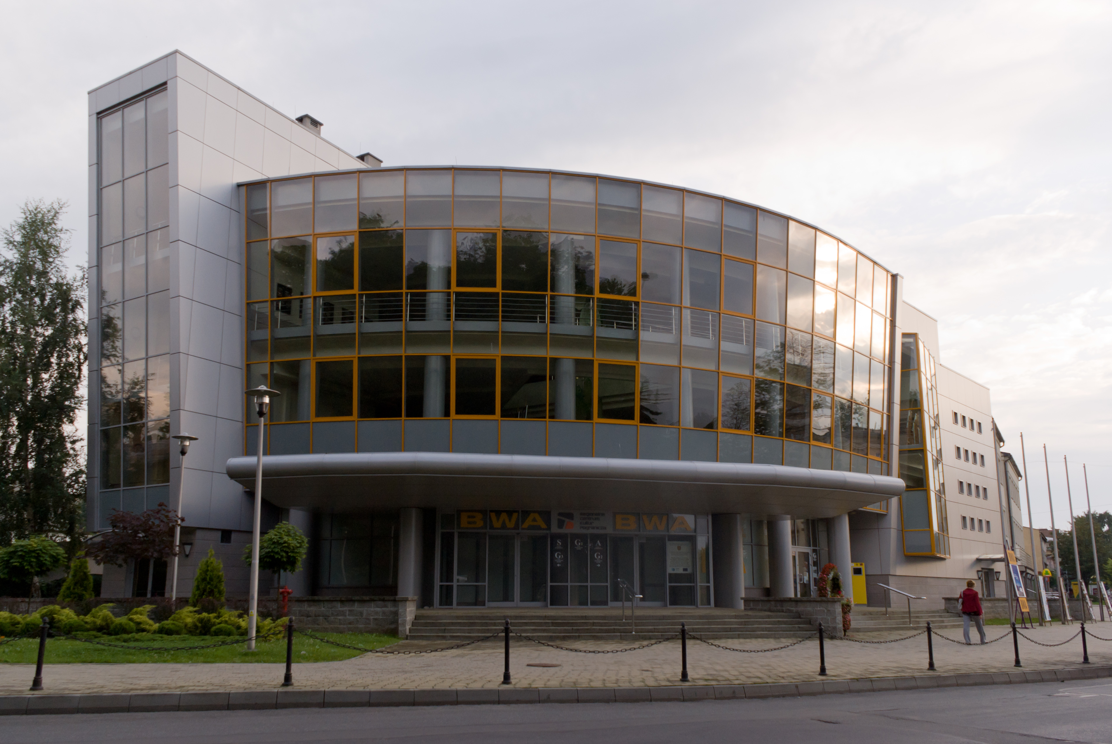 Biuro Wystaw Artystycznych w Krośnie, ul. Kolejowa 1